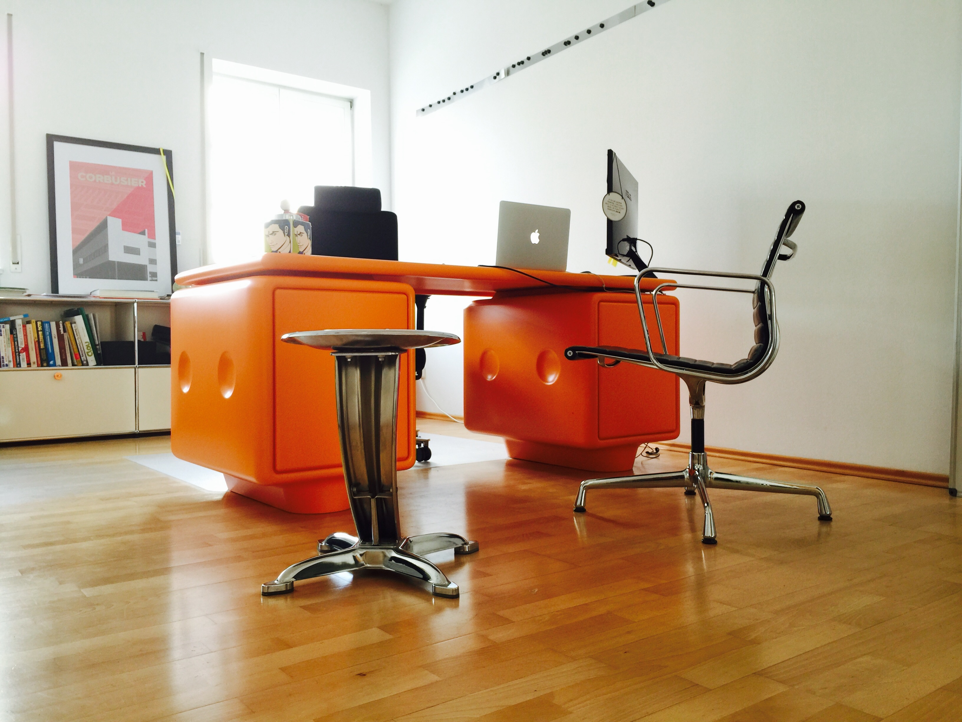 Einzelstück #0026